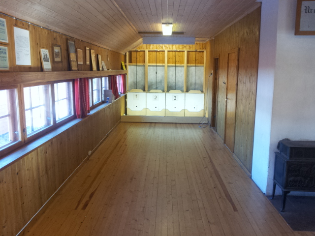 Innendørs 15-meter treningsbane på Linnerekka Skytebane.